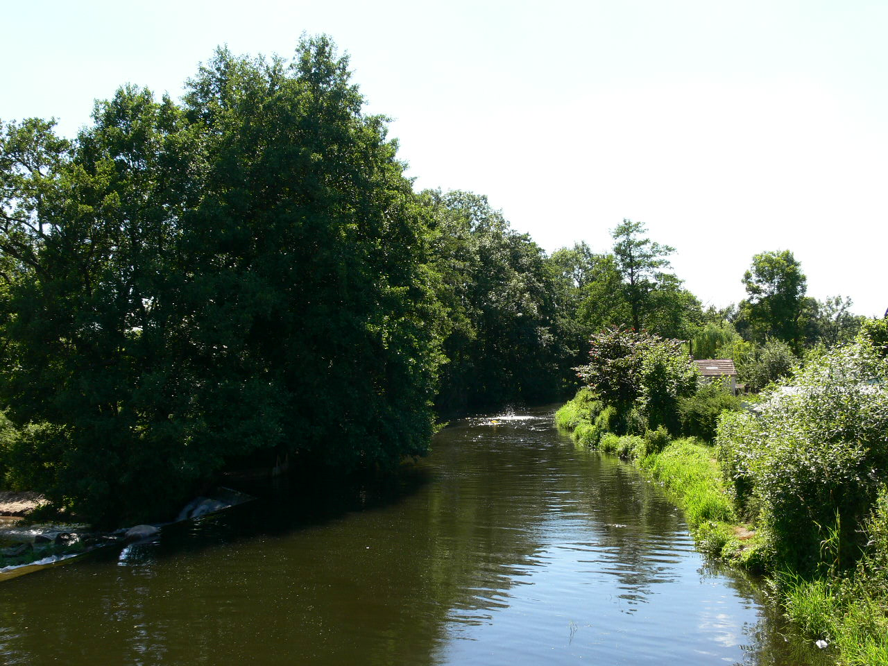 Karlino - rzeka Radew